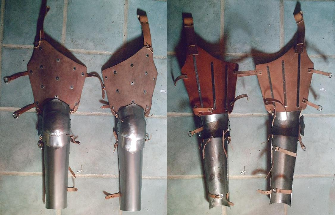 Jambières